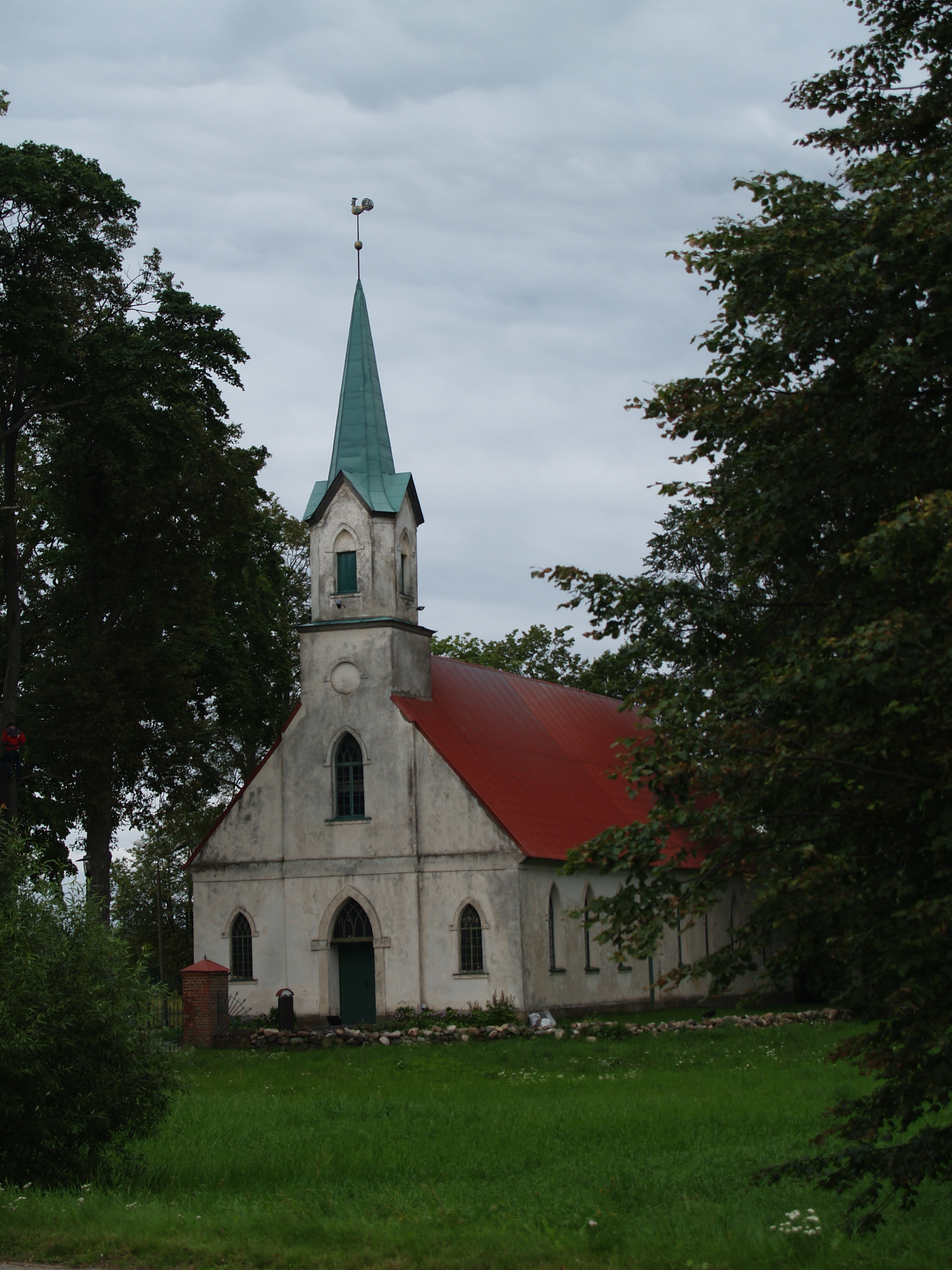 Salatsi luteriusu kirik